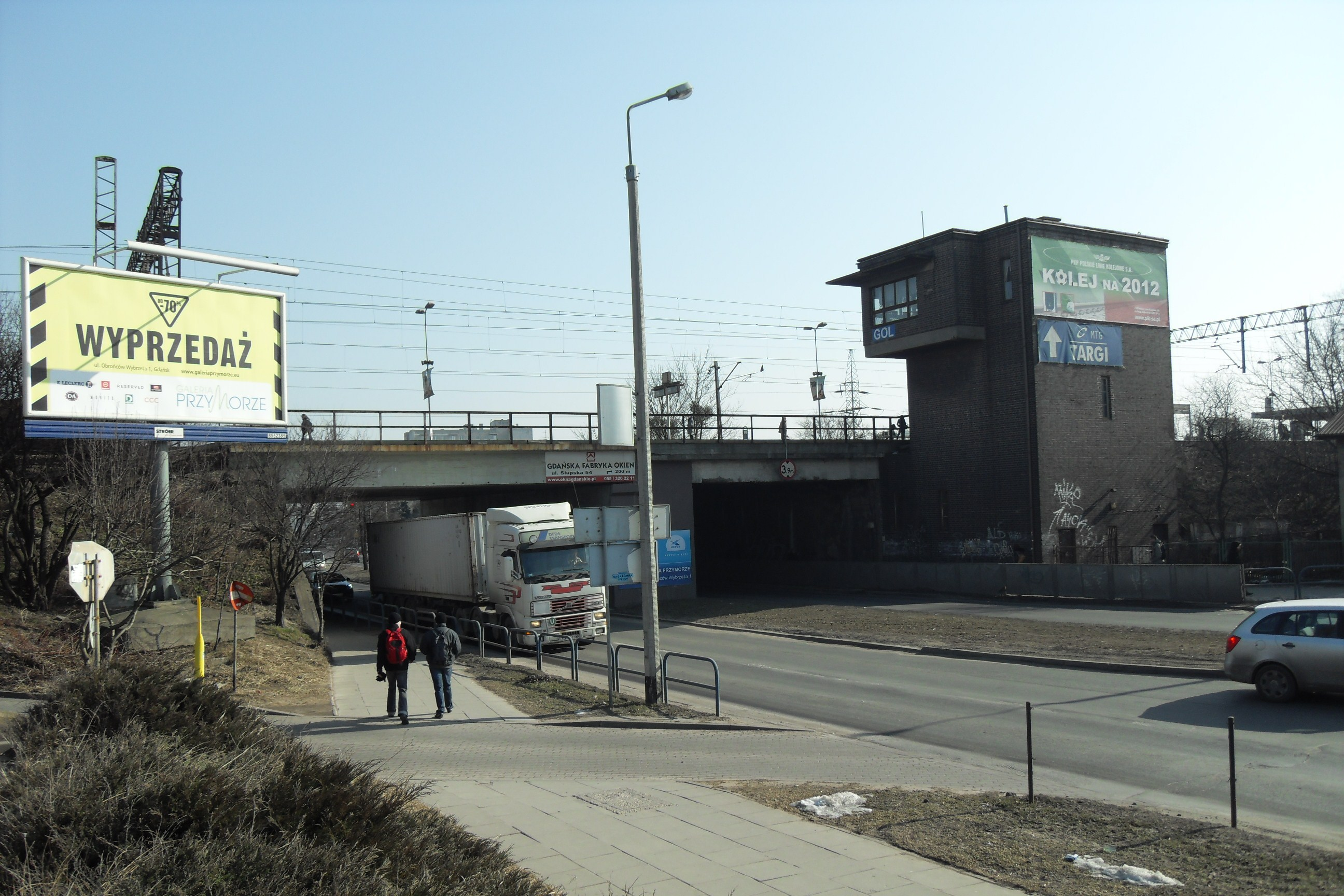 Gdańsk Oliwa, ul. Kołobrzeska. Wiadukt z przystankiem SKM Gdańsk Przymorze nad ulicą Kołobrzeską, na granicy Oliwy i Przymorza, strona zachodnia. Nastawnia GOL.